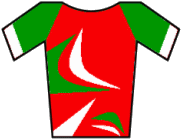 Maillot de Bielorrusia